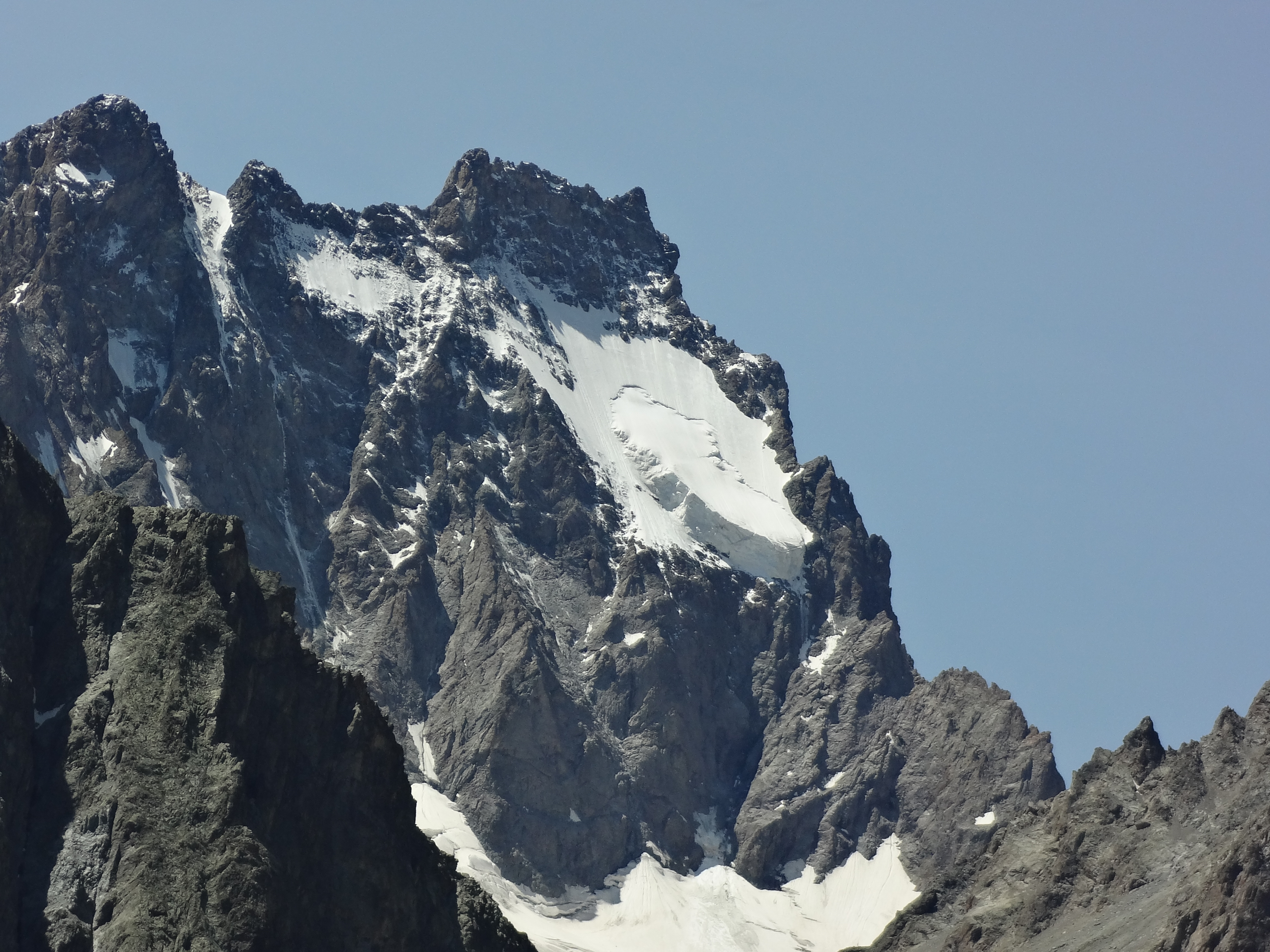 Glacier du pic de l’Ailefroide. On remarque une importante rimaye, ce qui indique peut être une fonte et une prochaine dislocation du glacier dues au changement climatique.